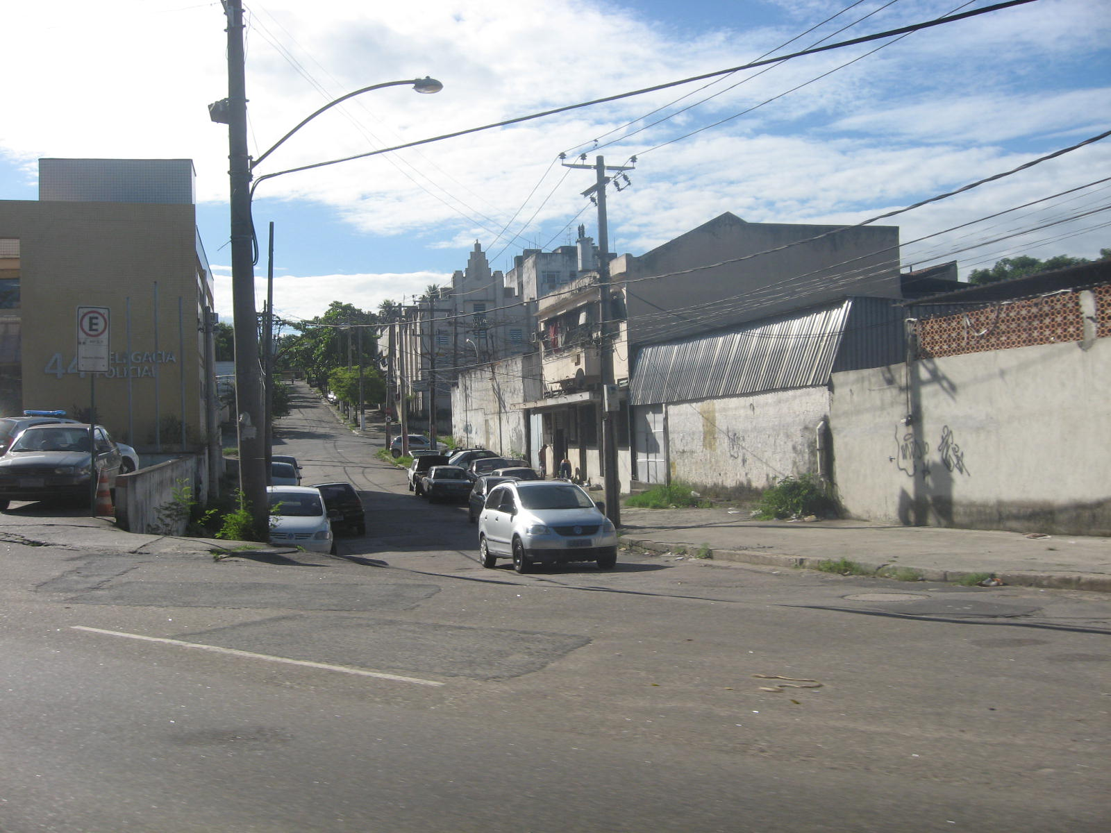 Vista do bairro de Inháuma, localizado na zona norte da cidade do Rio de Janeiro, RJ, Brasil.